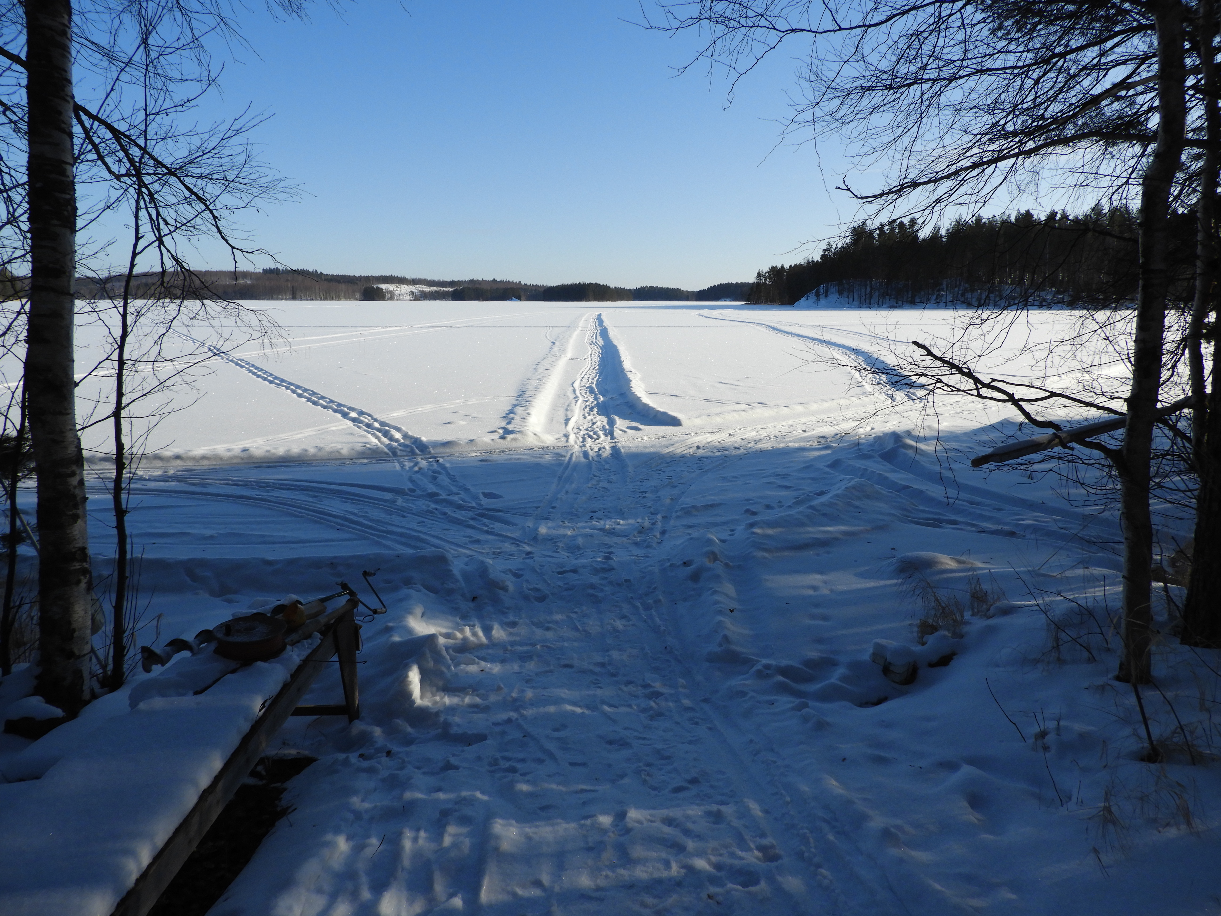 Talvinen kuivinselkä Pellossalosta nähtynä. Oikessa reunassa Aittosaari.